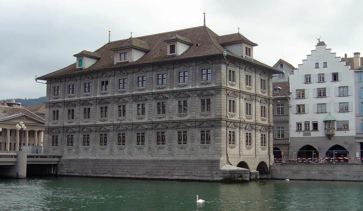 Das Zürcher Rathaus (Westseite)